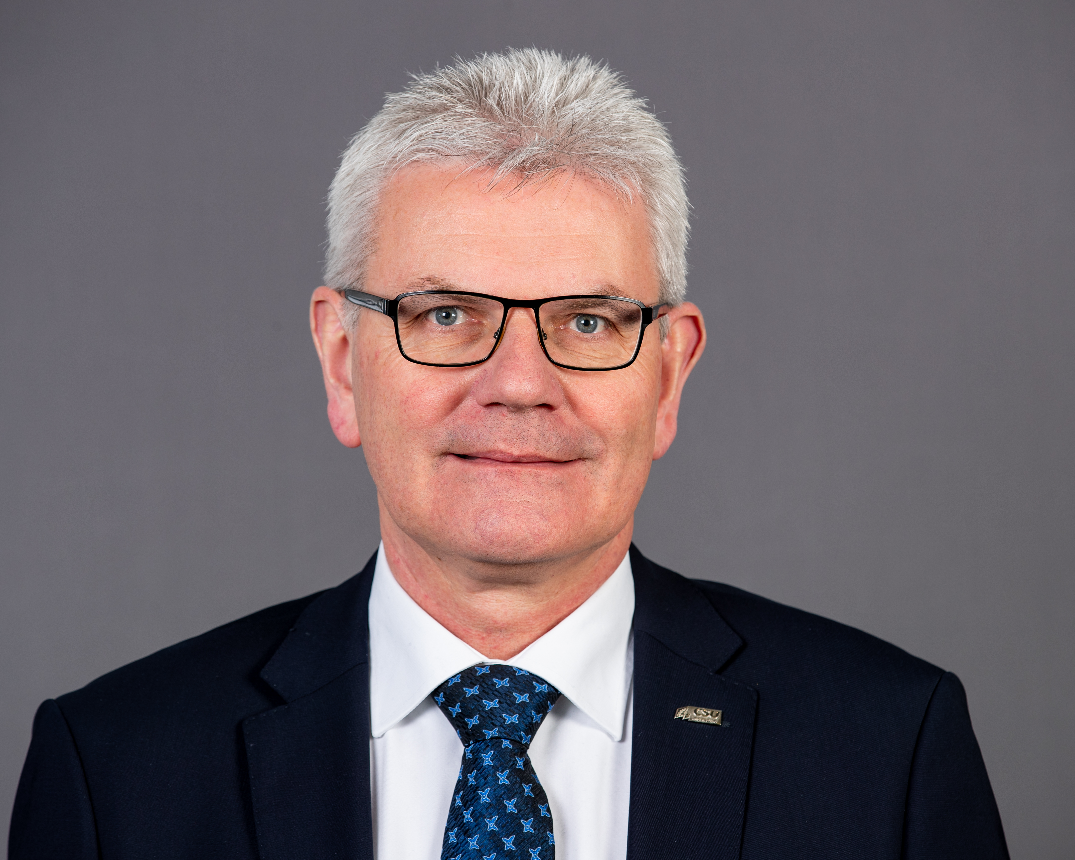 Artur Auernhammer, CSU